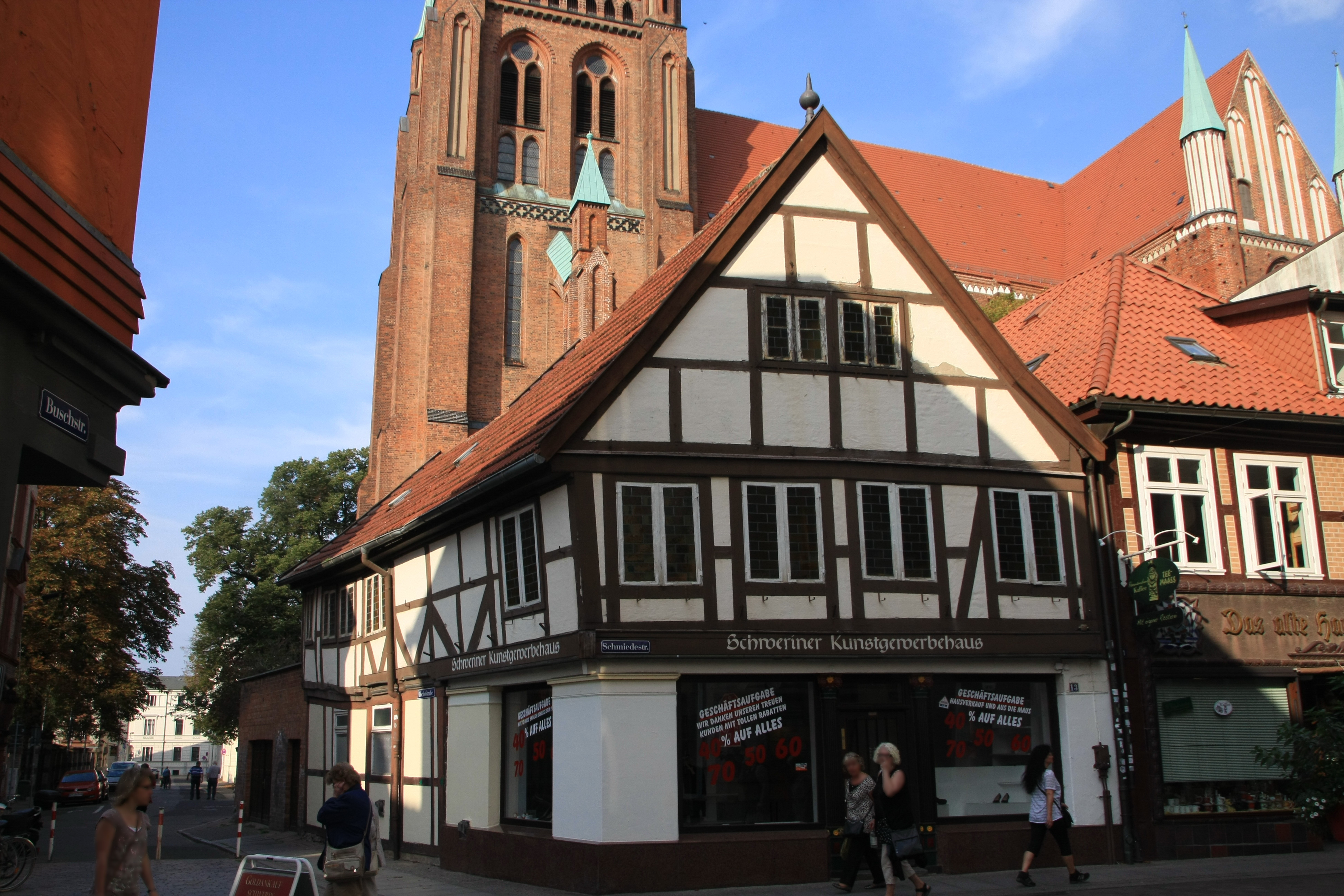 19053 Schwerin, Schmiedestraße 13